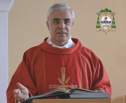 S.E. Mons. Luigi RENNA